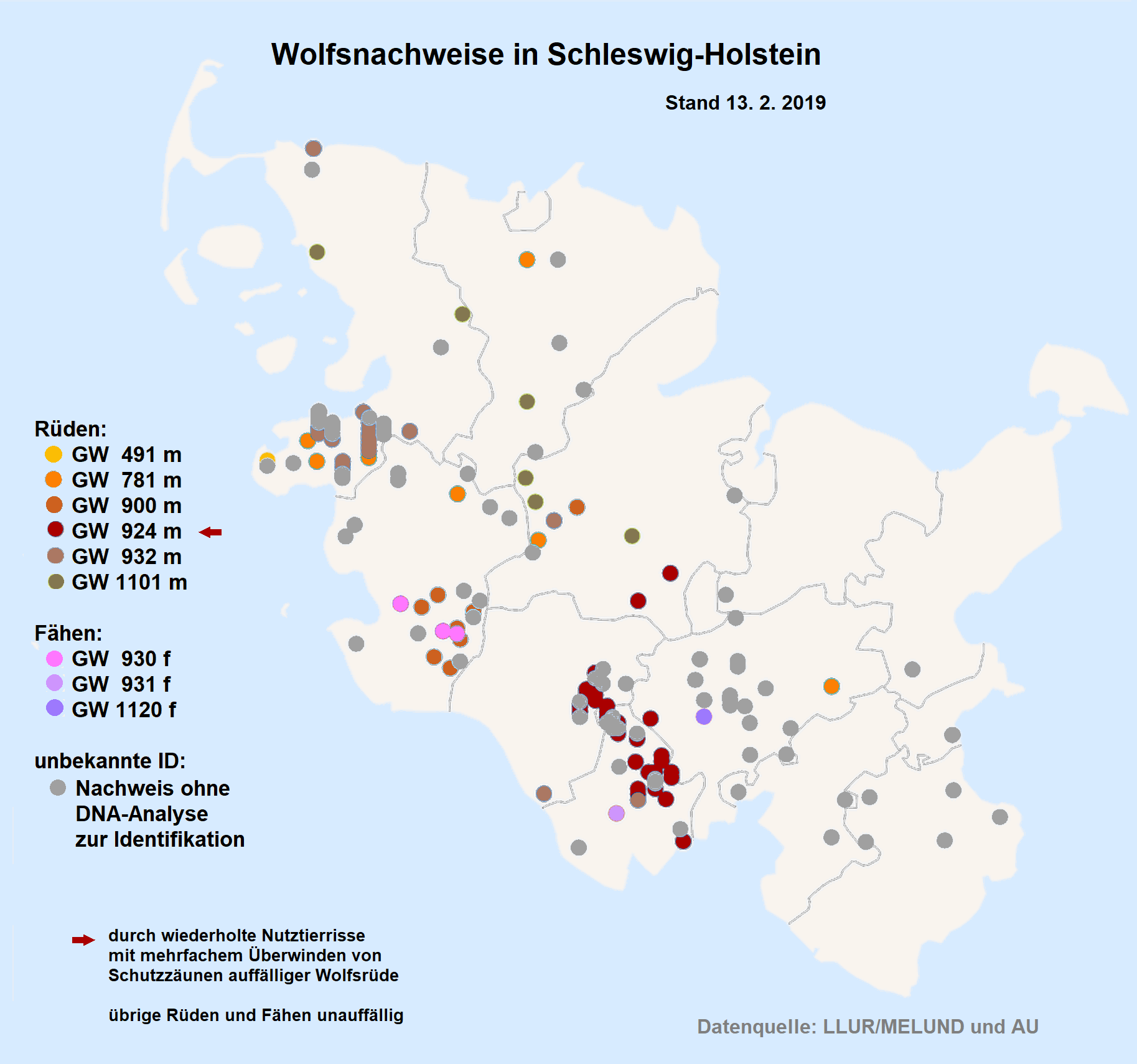 Nachgewiesene Wölfe in Schleswig-Holstein, ein auffälliges Tier, die übrigen unauffällig. Die Fähe GW 931 f wurde auf der A 23 überfahren.[1] Für die zwei noch lebenden Fähen stehen mehrere Rüden zur Verfügung, um den Wolfsbestand zu erhalten.